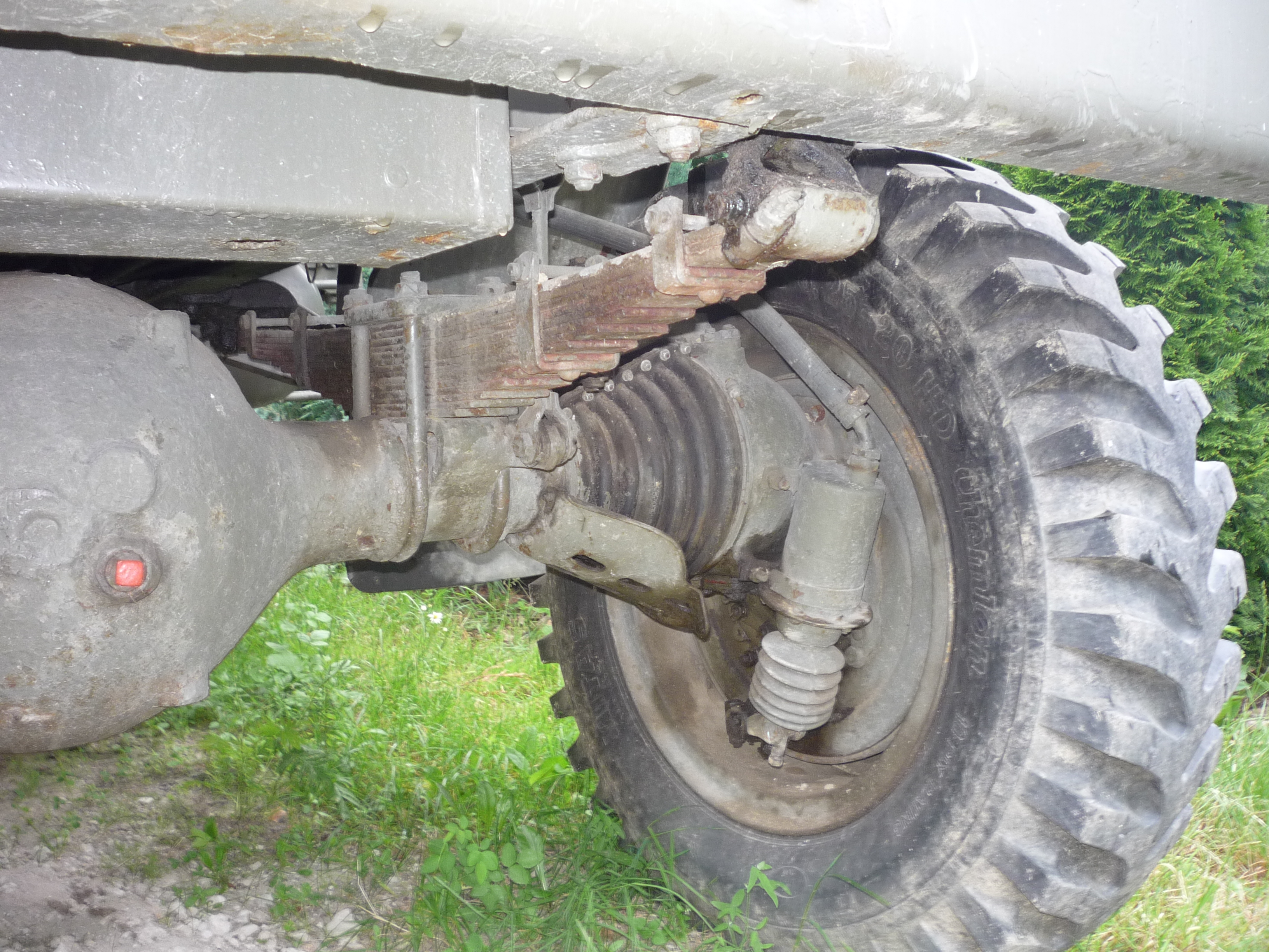 Autor fotografie Jiří Zelenka. Praga V3S - vojenská štábní spojařská verze. Khaki nátěr. Modernizovaná pro vojenské účly 1990 - 2000. Czech Republic.